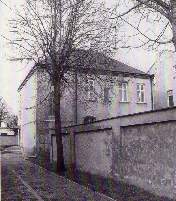 Wikariat z 1924 roku